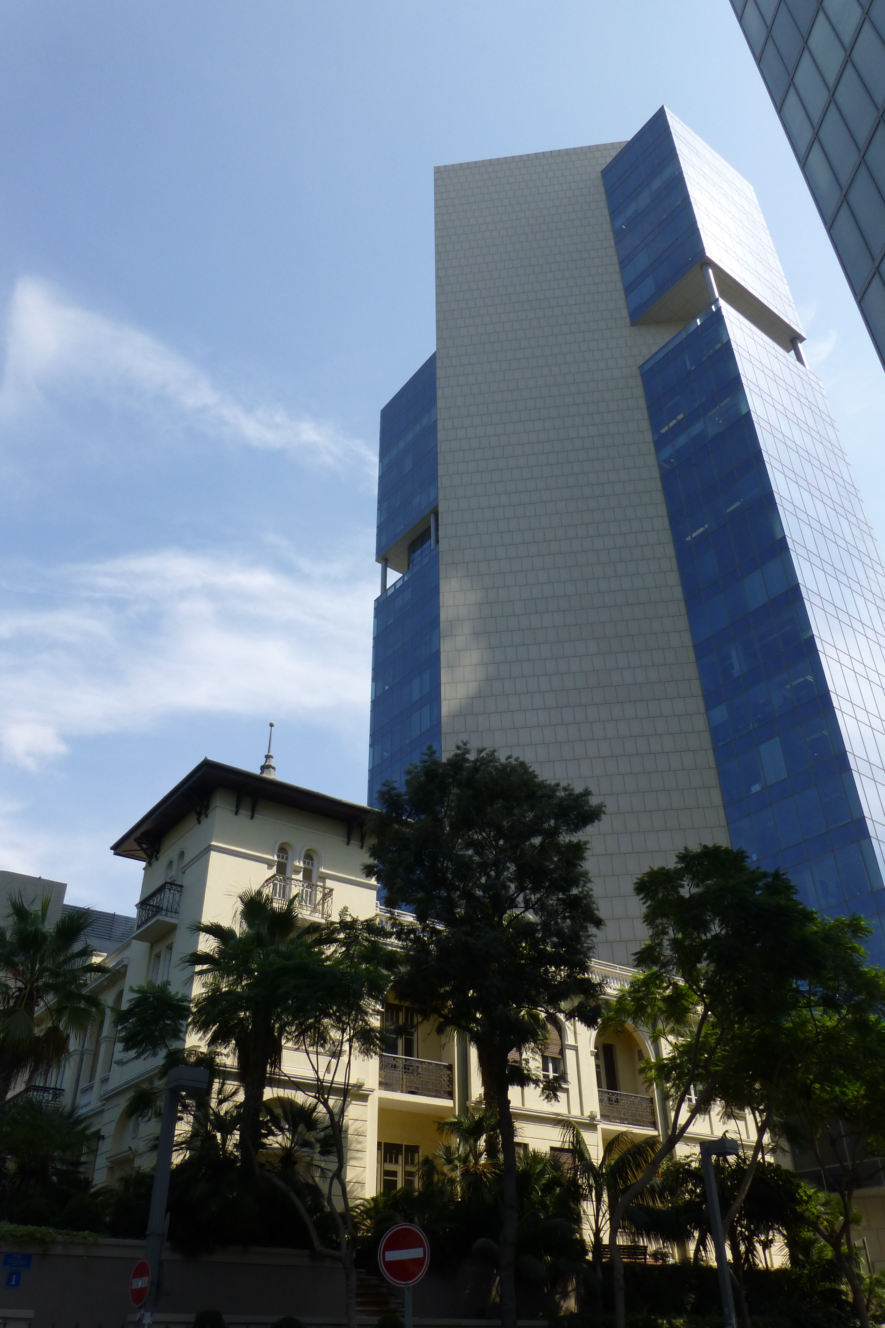 בית השגרירות הרוסית הוא מבנה היסטורי הממוקם בשדרות רוטשילד מספר 46, פינת רחוב שד"ל בתל אביב, והוא אחד מבנייניה הנודעים של העיר. הבניין מתאפיין באדריכלות של הסגנון האקלקטי הייחודי ללב תל אביב. הבית תוכנן ב־1924 על ידי האדריכל יהודה מגידוביץ', עבור משפחת לוין האמידה. הוא משופע בקישוטים וסמלים ברוח הסגנון הרומנטי, ובחזיתו פגודה. עם השנים החליף הבניין בעלים, ואחרי הקמת המדינה שכנה בו צירות ברית המועצות. ב־9 בפברואר 1953, בשעות הערב, בוצע בו הפיגוע בצירות הסובייטית שבעקבותיה ניתקה ברית המועצות את יחסיה הדיפלומטיים עם מדינת ישראל. היחסים חודשו רק לאחר מות סטלין ביולי 1953.